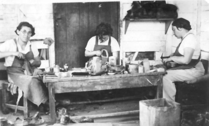 גן-שמואל - הסנדלריות רחל יוספזון-כהו פייגה שוסדק עובדות בצריף הסנדלריה - 1935-8